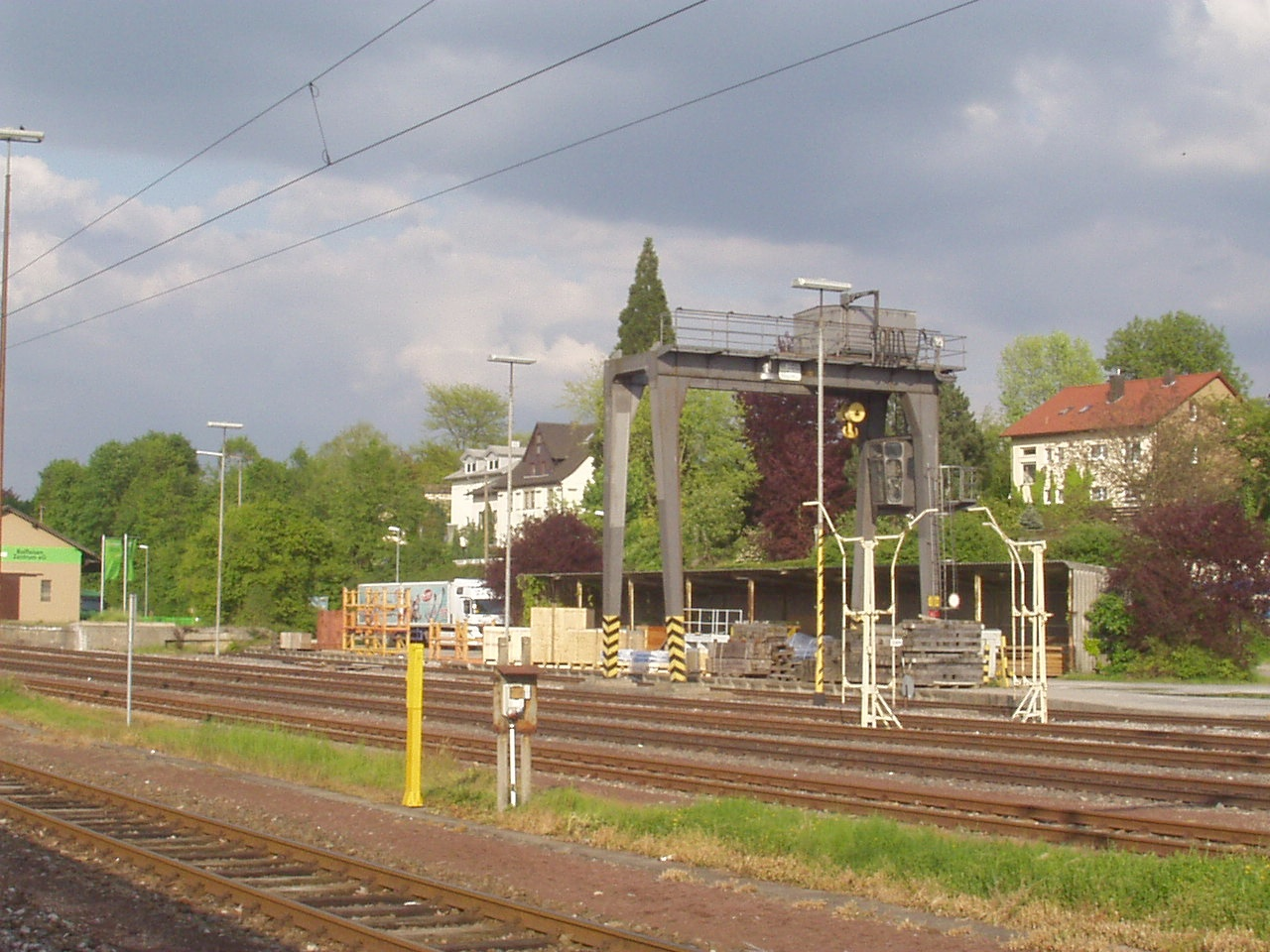 Ortsgüteranlage mit Bockkran in Eppingen